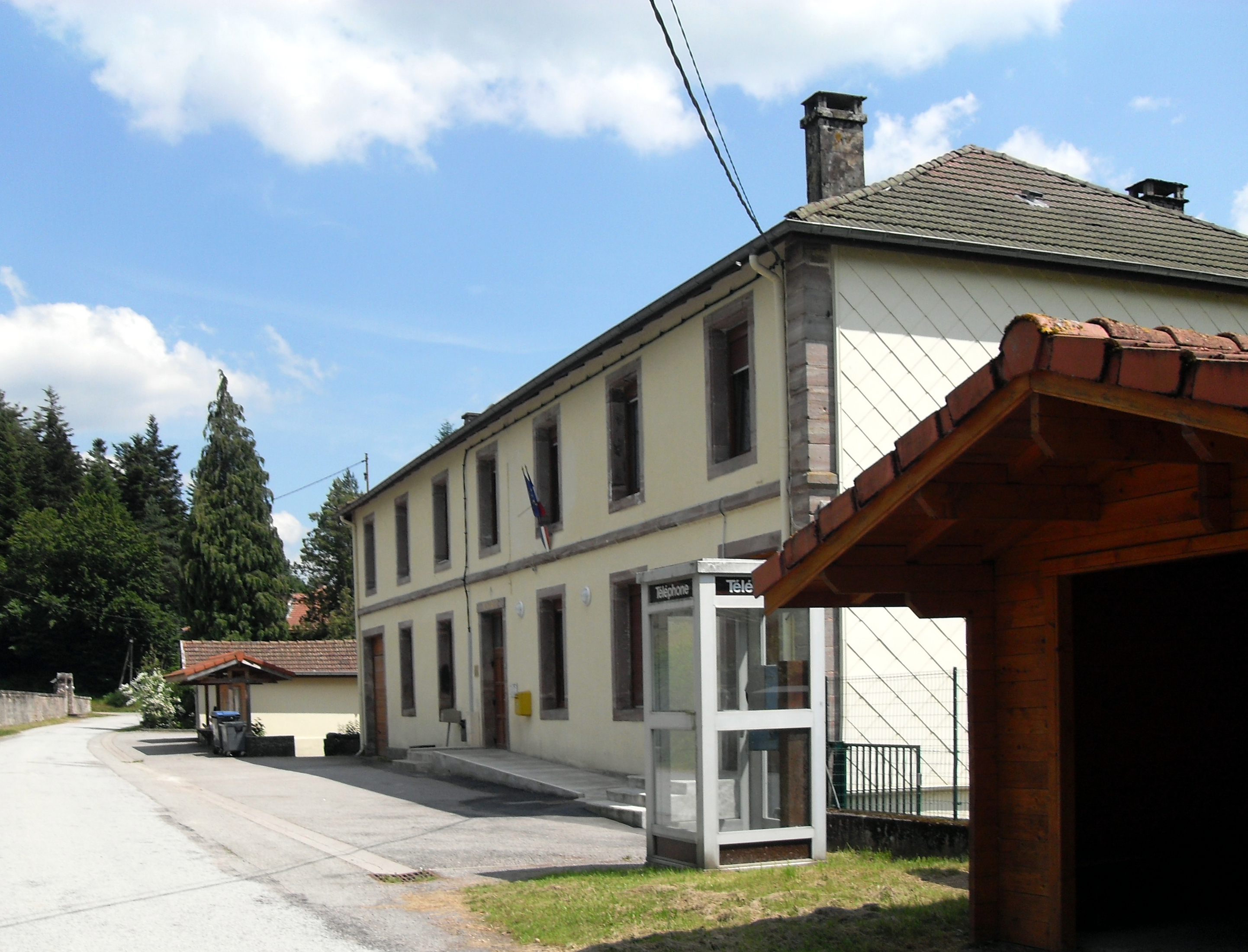 La mairie des Rouges-Eaux